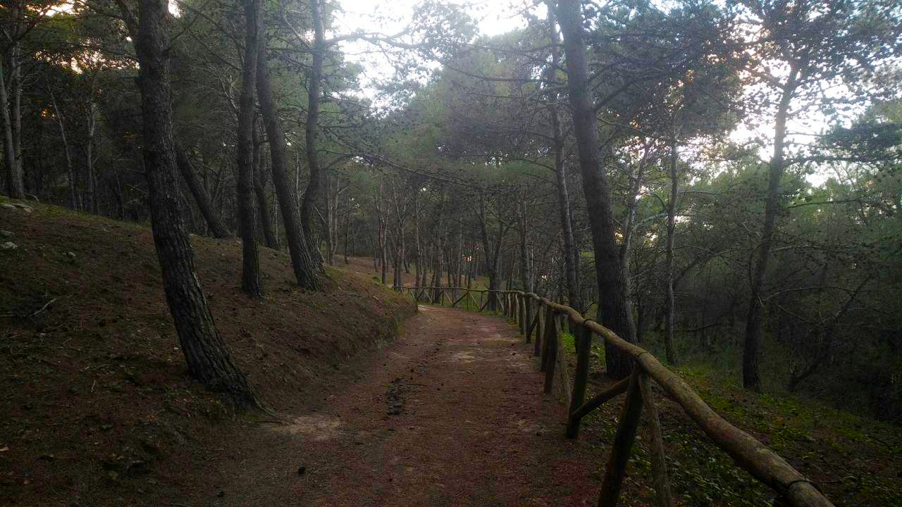 Pineta Porto Torres